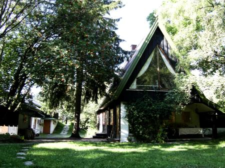 Verkstedet